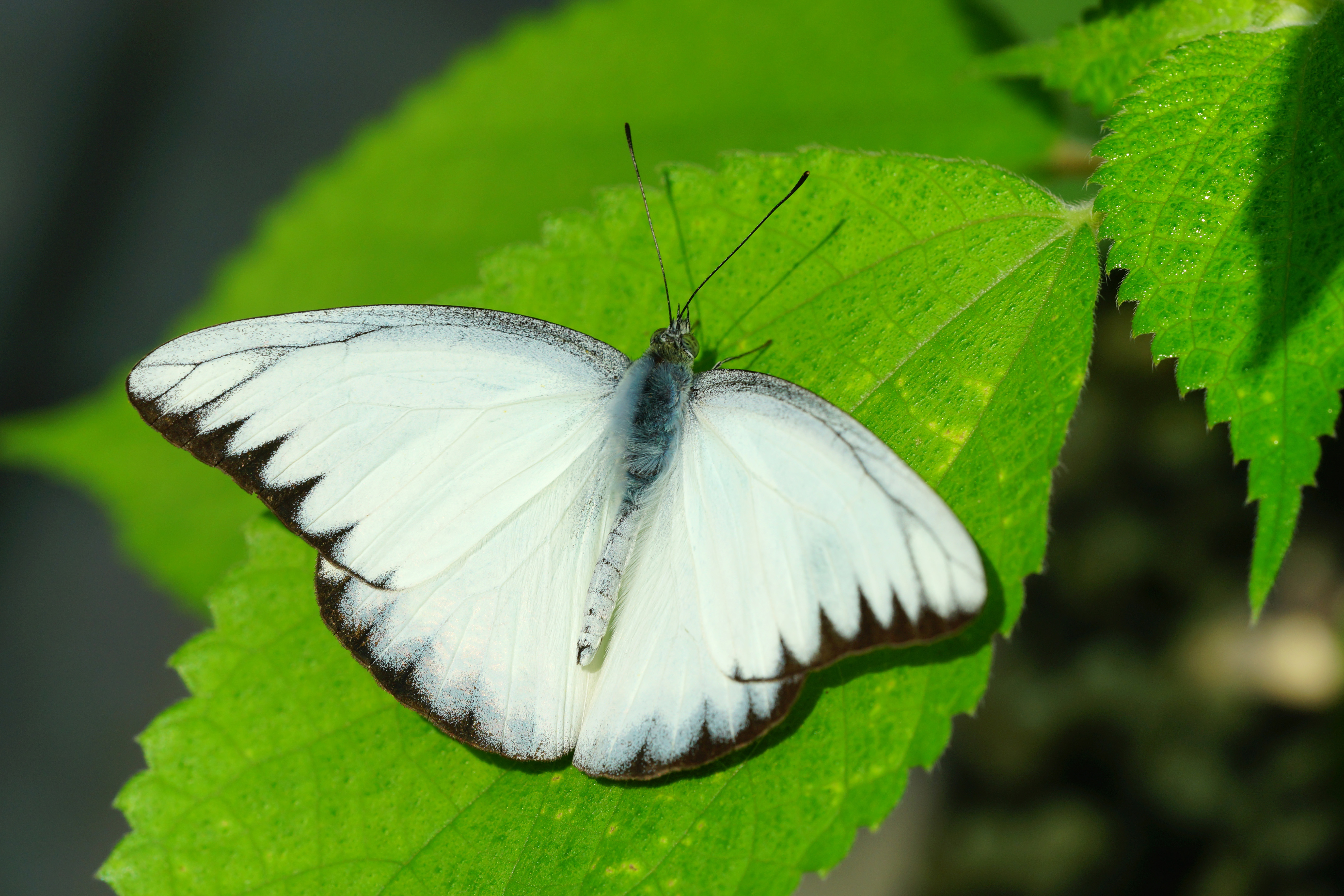 中文（台灣）: 異色尖粉蝶 Appias lyncida eleonora